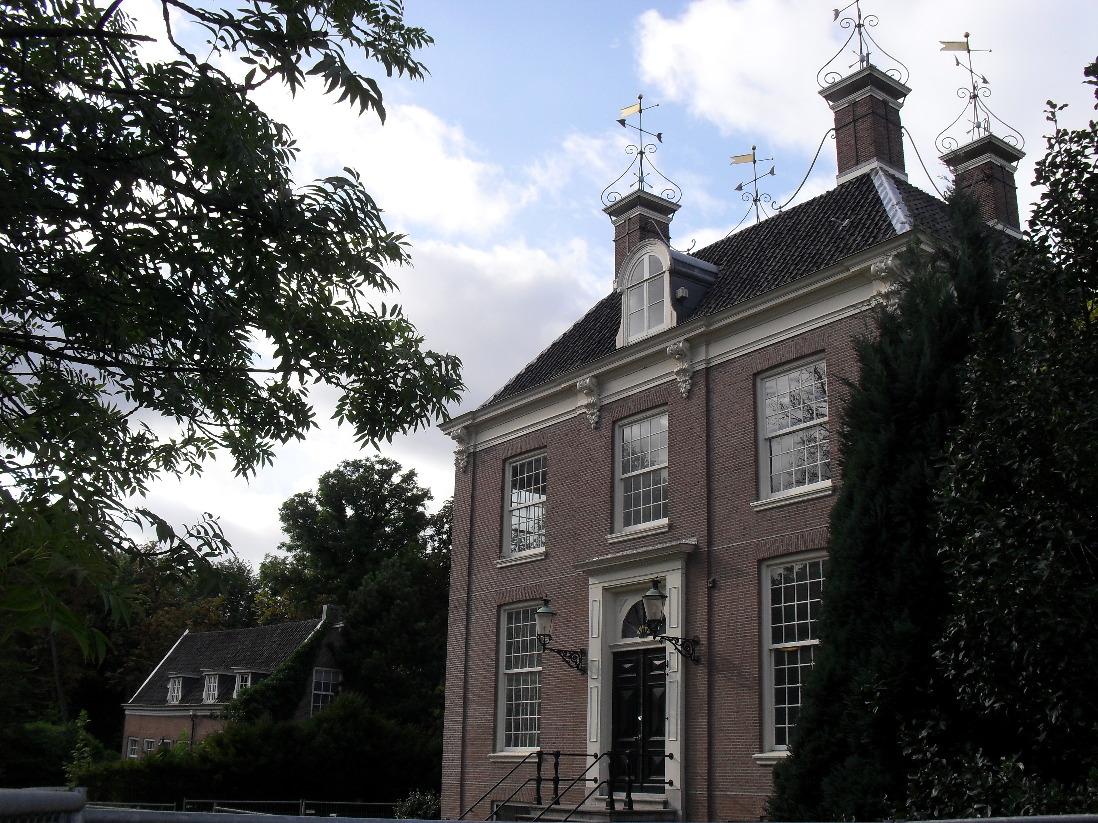 Buitenplaats Amstelrust